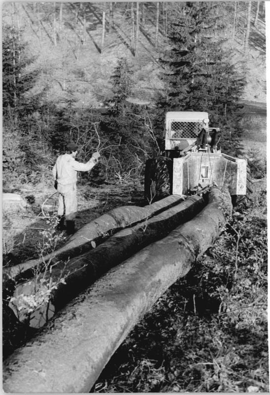 Meiningen, Holzrücken ADN-ZB Schaar 18.3.75 Bez. Suhl: Beim Erfassen des wichtigen Rohstoffes Holz alle Reserven zu erschließen, ist erstrangiges Wettbewerbsanliegen im Staatlichen Forstwirtschaftsbetriebes Meiningen. In der Oberförsterei Wernshausen ist dabei ein Knickradschlepper LKT 75 aus der CSSR unentbehrlicher Helfer.